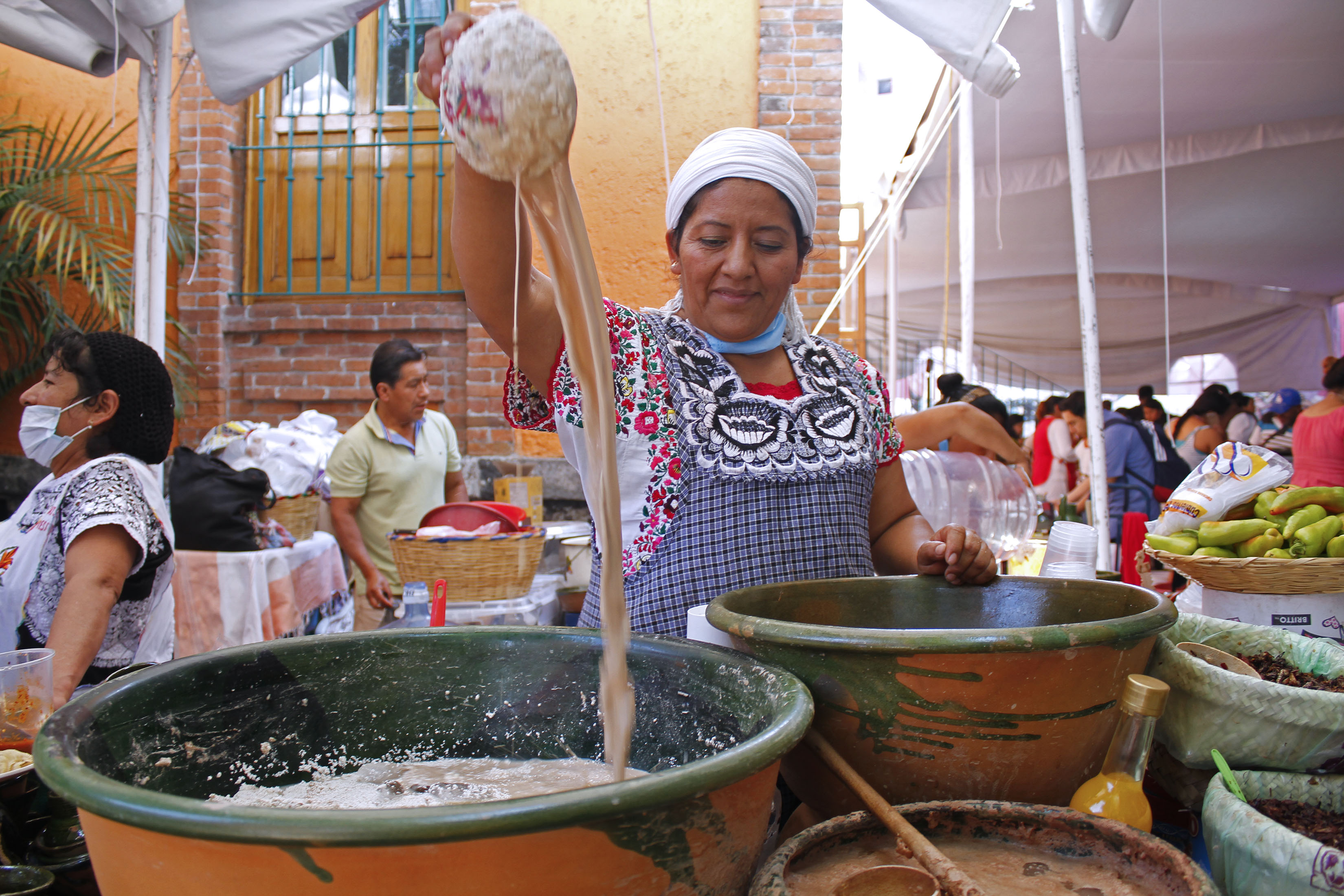 Domingo 20 de mayo de 2018 En el Museo Nacional de Culturas Populares, en el marco de la Primer Muestra Alimentaria Indígena de la CDMX, se realizó la plática taller Los quelites en la alimentación tradicional, impartida por Adriana Martínez, el recital de poesía en lenguas indígenas, así como la presentación de danzas típicas del estado de Oaxaca. Fotografía: Maritza Ríos / Secretaría de Cultura CDMX